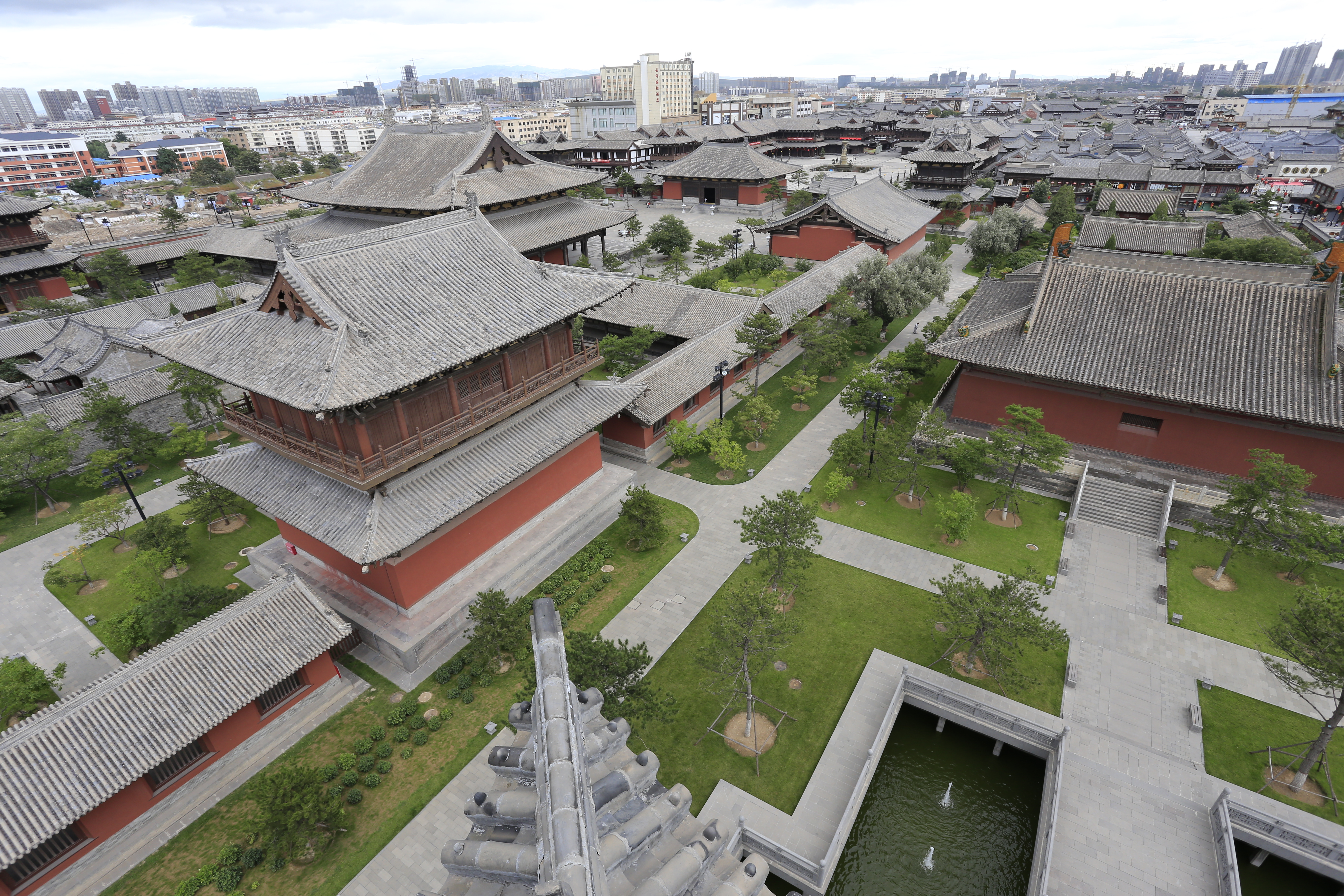 大同华严寺—— 华严宝塔上俯瞰普贤阁和薄伽教藏殿